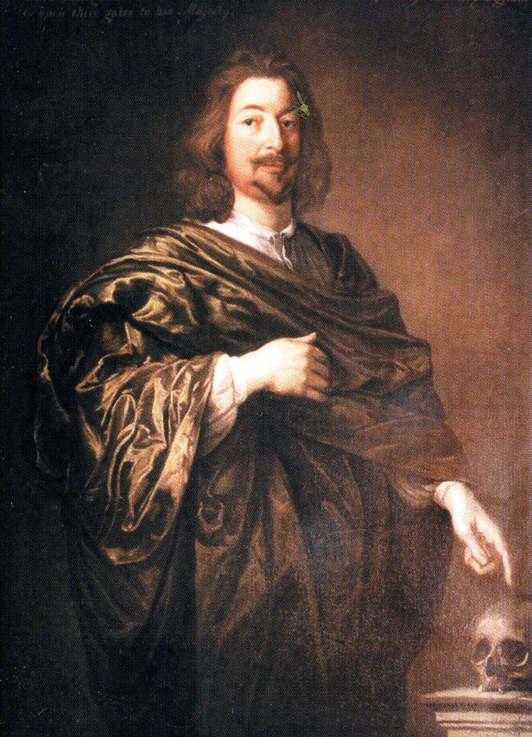 Lord Leigh